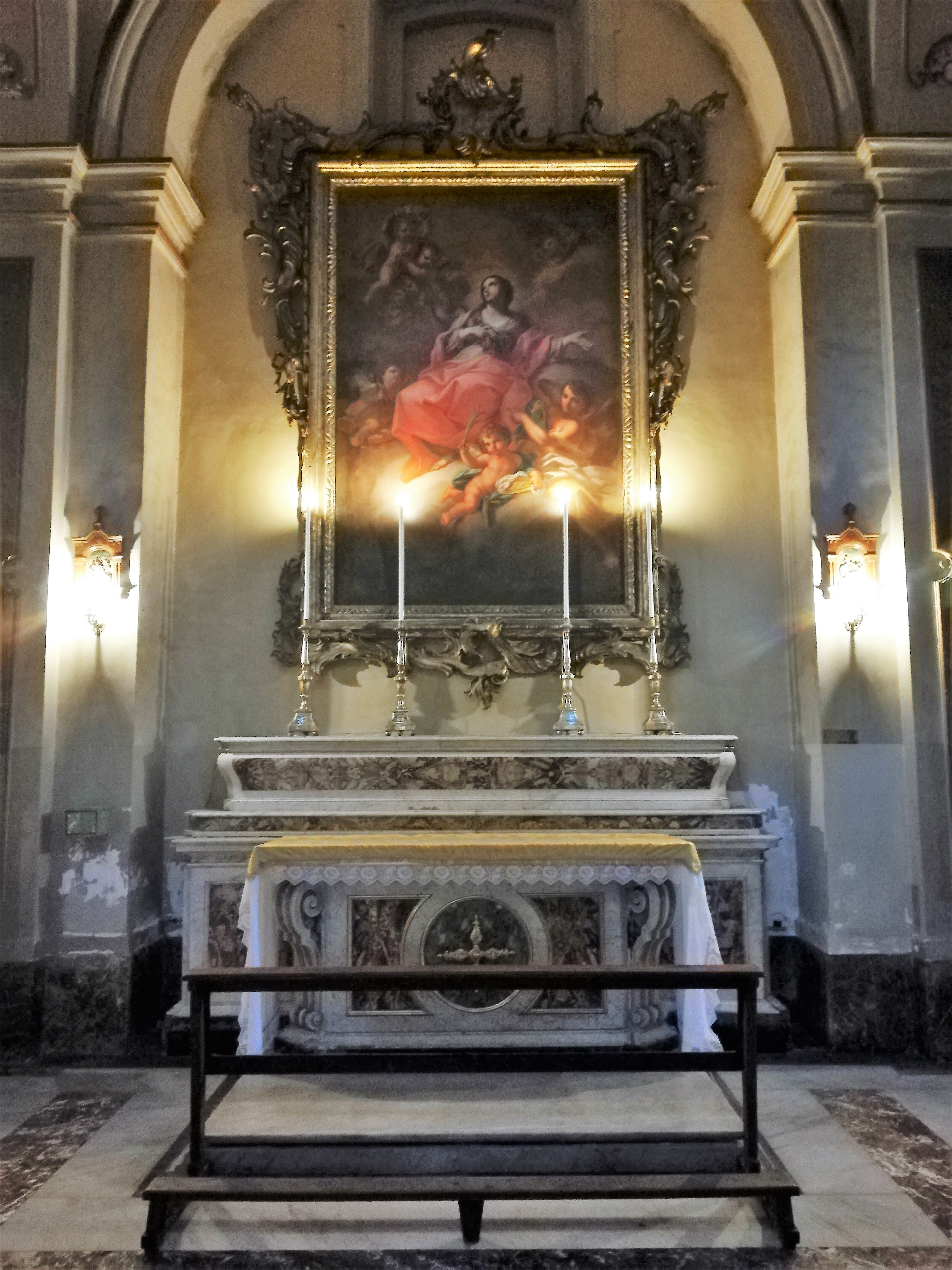 Cappella di Santa Apollonia. Santa Apollonia, opera di Olivio Sozzi.